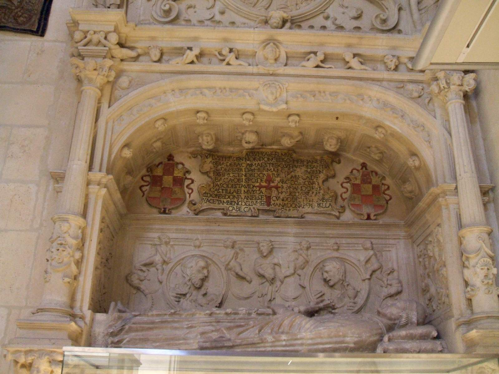 Sepulcro de Pedro Fernández Cabeza de Vaca († 1384), maestre de la Orden de Santiago y fallecido a causa de la peste durante el sitio de Lisboa de 1384. Se encuentra en la capilla de San Juan Bautista y Santiago de la catedral de Burgos.